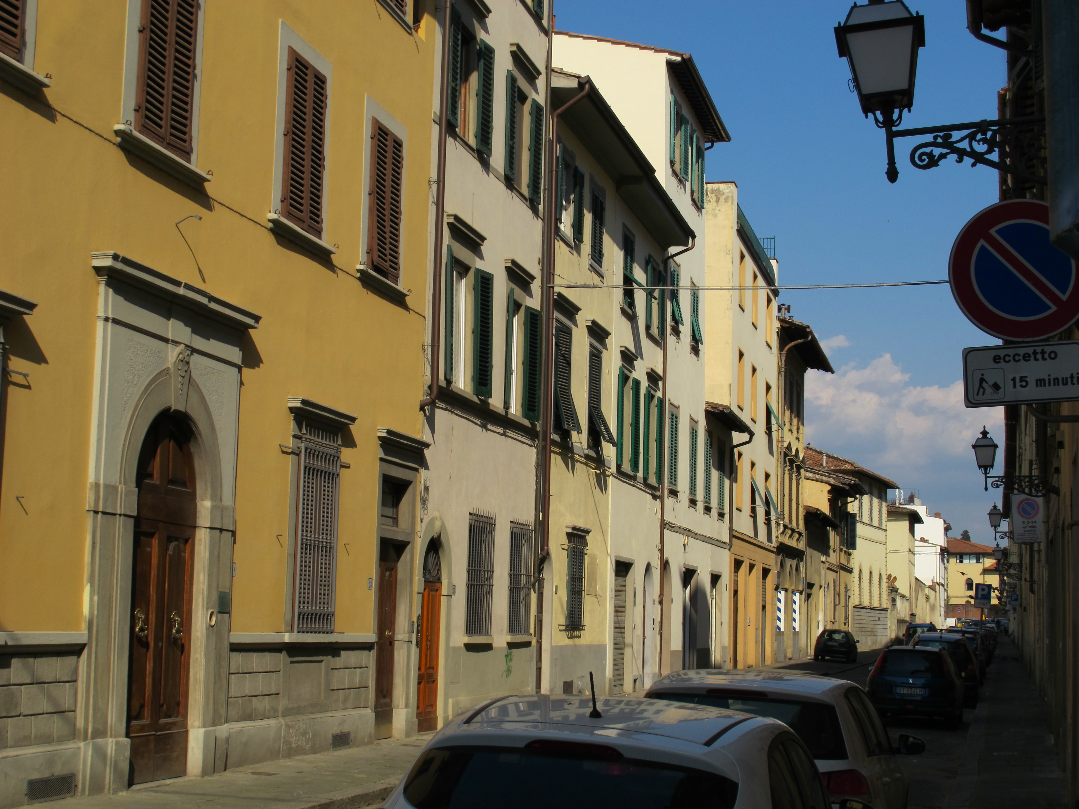 Via tripoli, veduta